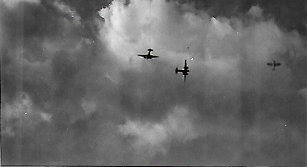 Turun pommitus 1941